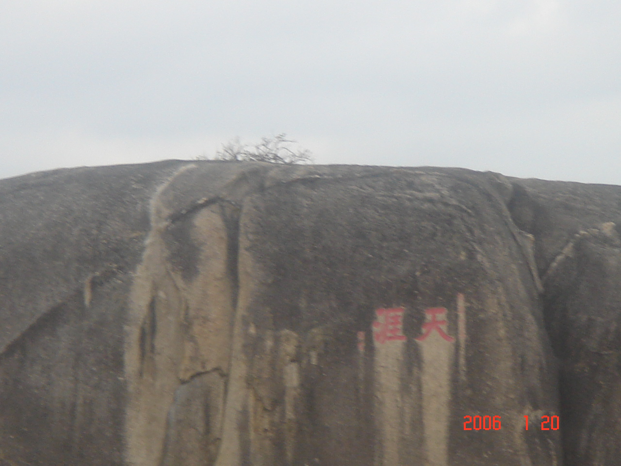 天涯海角石正面“天涯”二字，雍正十一年崖州太守程哲题，位于中国海南省三亚市天涯海角风景旅游区内